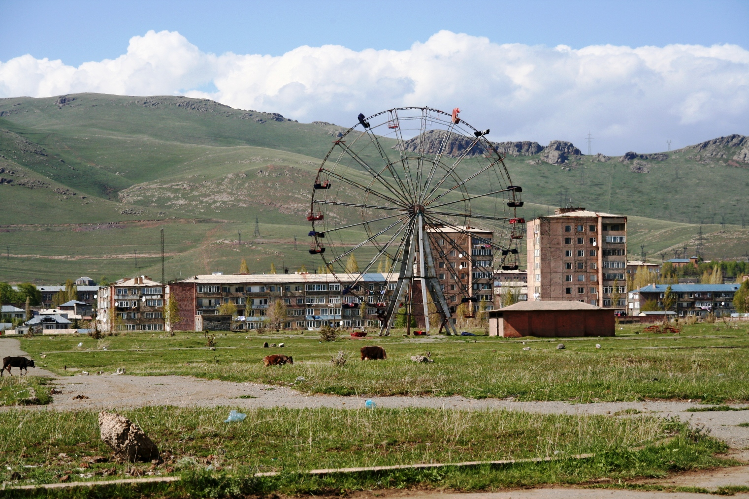 Prés à vache en banlieue de Sevan, Arménie